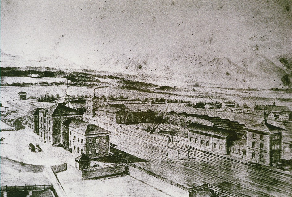 Alter Bahnhof und Bahnbetriebswerk Rosenheim. Hochgeladen am 23. Juli 2009, 14:09:05